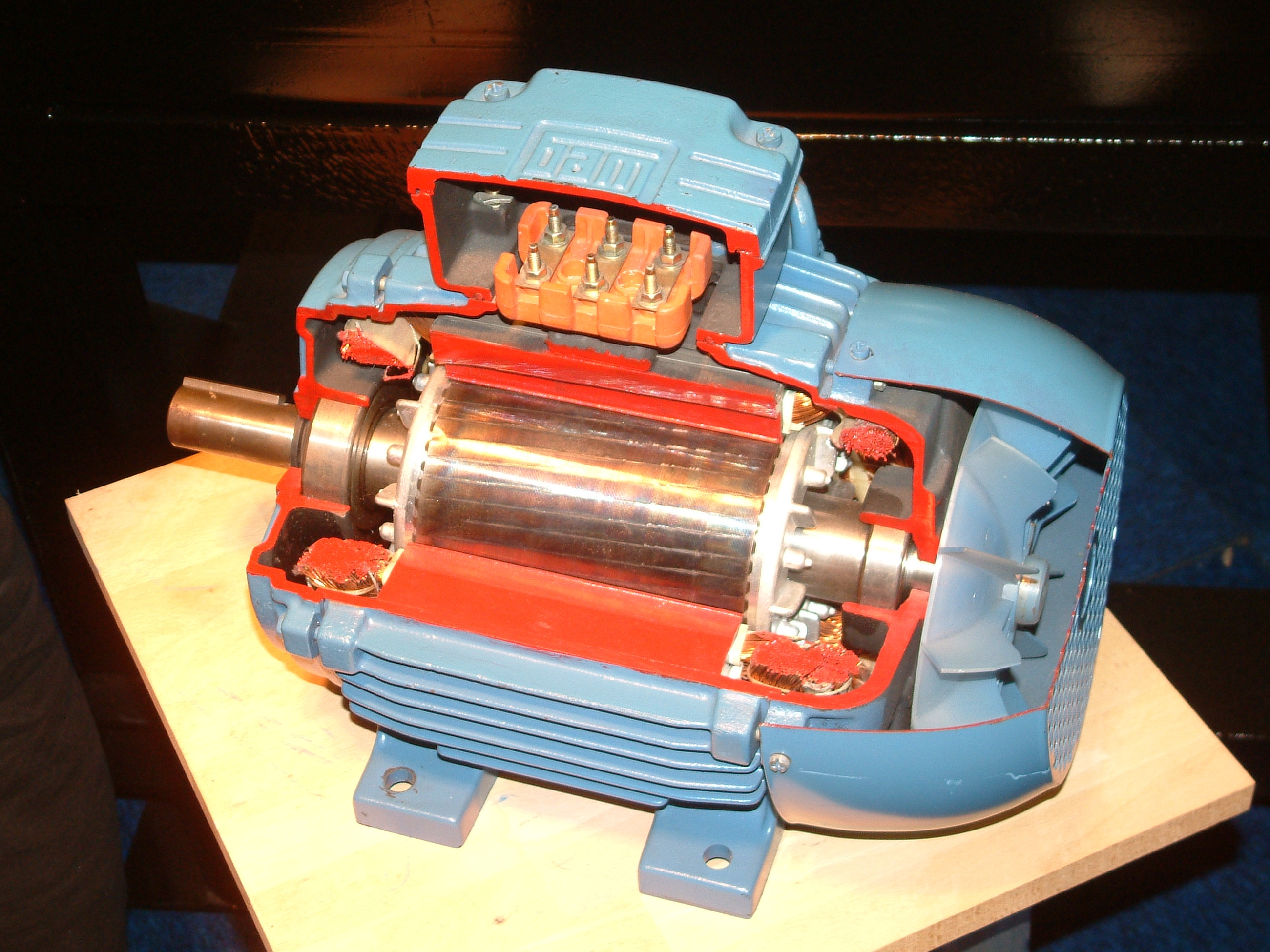 Europort 2009